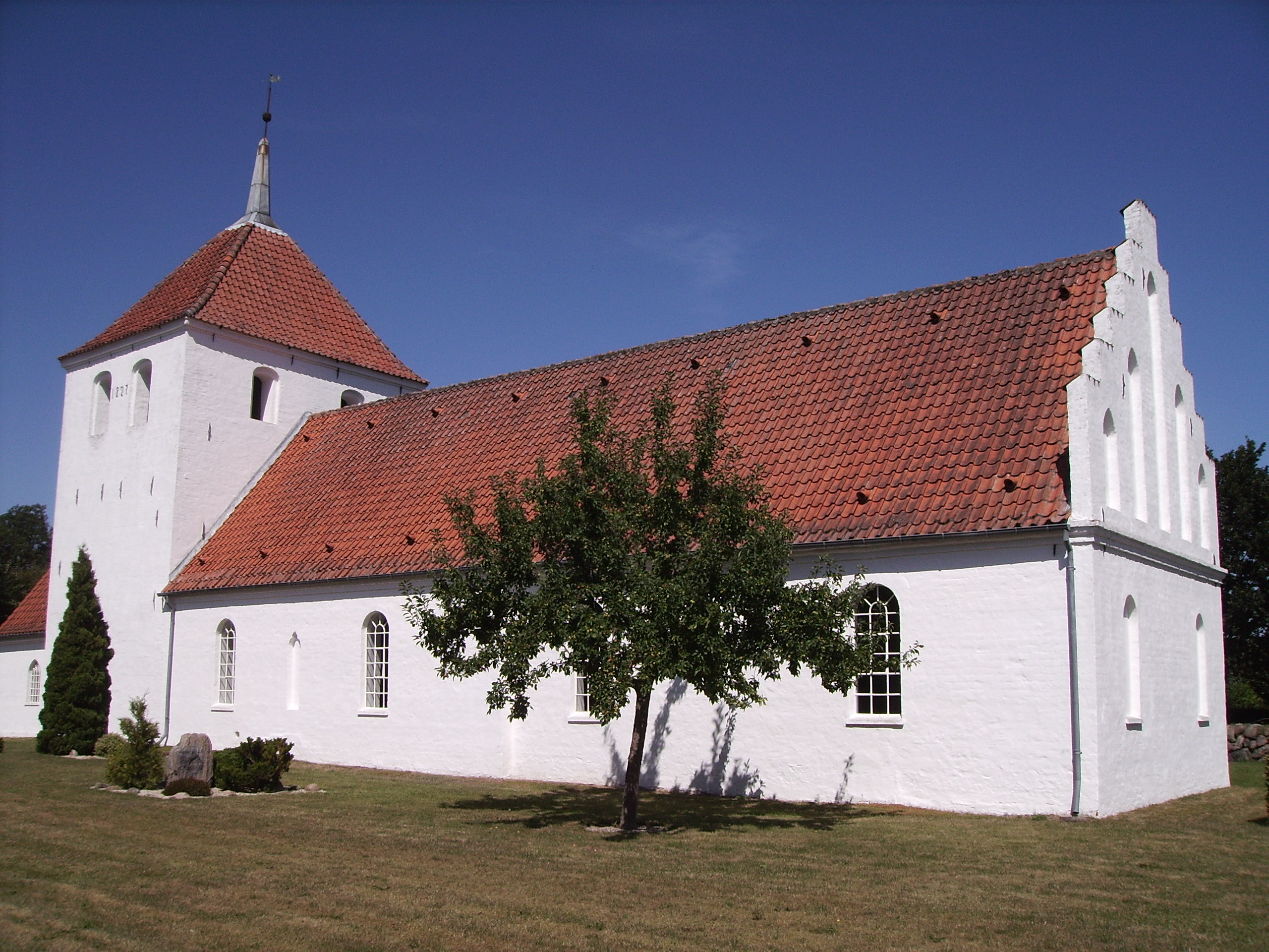 Østrup Kirke, Østrup Sogn, Lunde Herred, Odense Amt, Denmark (Danish Church) - Østrup Kirke fra sydøst